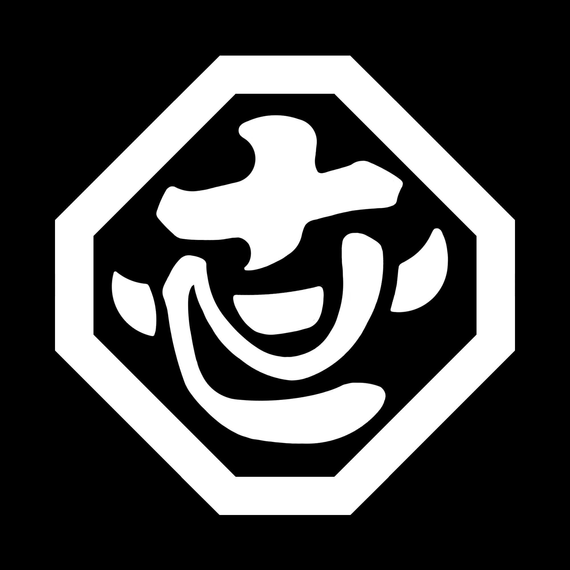 「折敷型に世の字」紋（染抜）